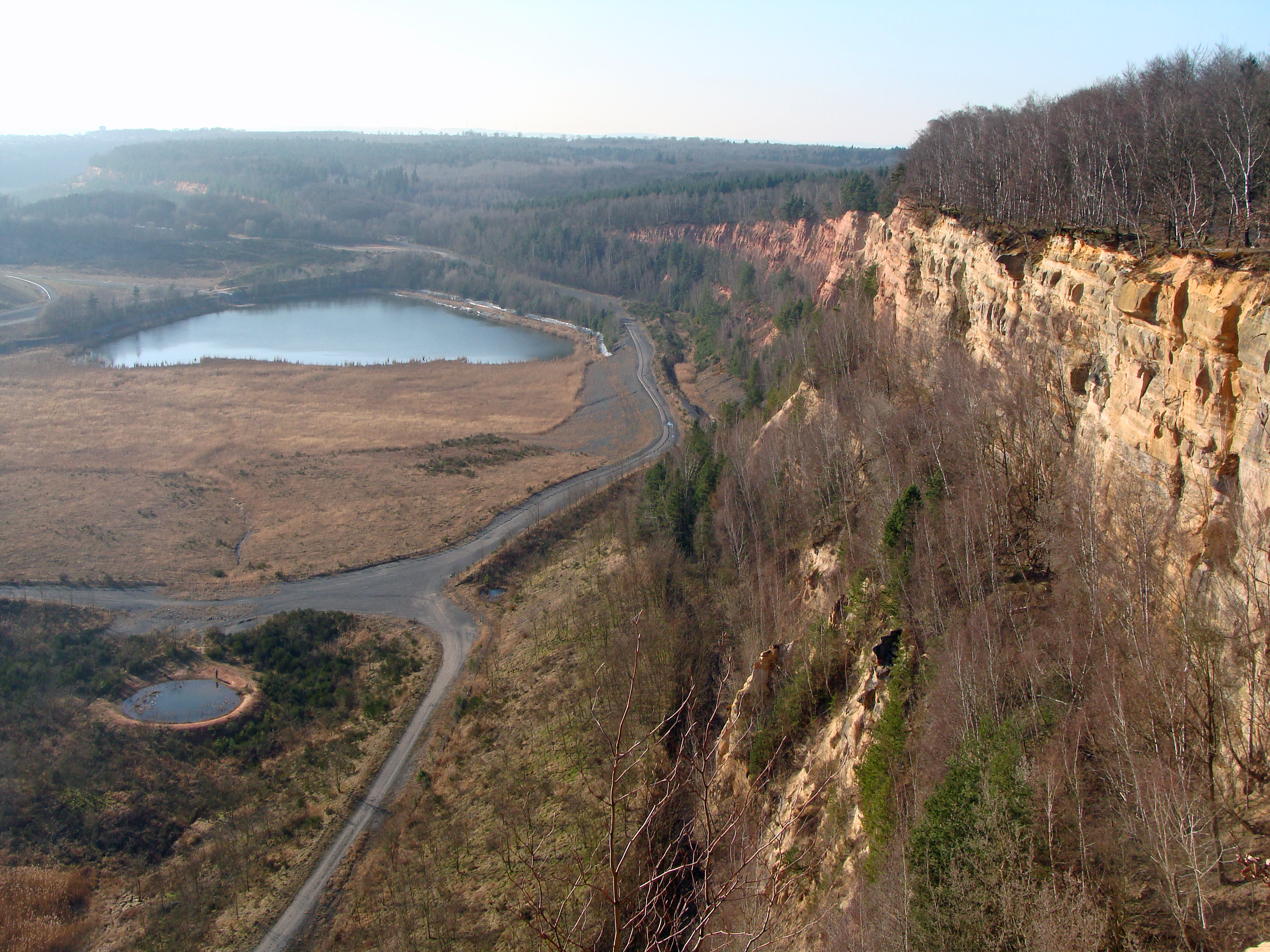 Carrière du Barrois, vue de la plate-forme d'observation de Freyming-Merlebach (située entre Freyming-Merlebach et L'Hôpital). Photographie prise le 10 mars 2014. Vue vers l'ouest en direction de L'Hôpital (Moselle).